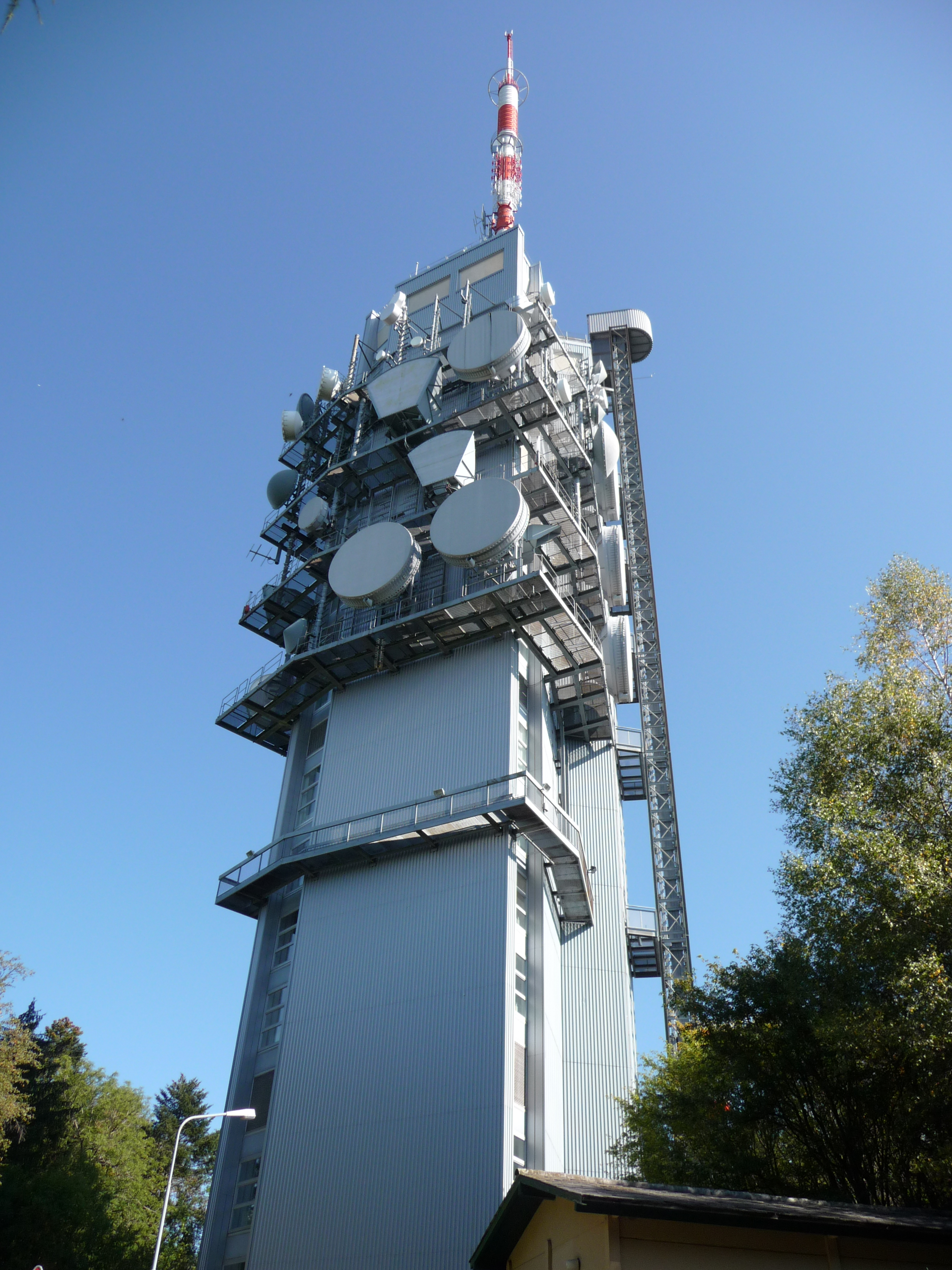 Der Fernsehturm Mont Pèlerin in der Schweiz.